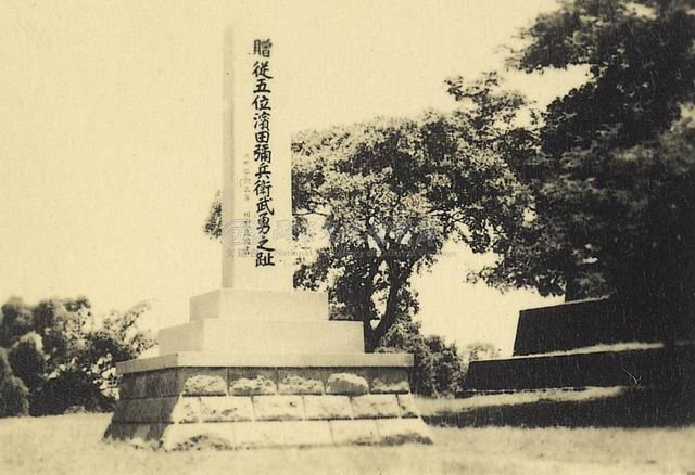 日本人紀念濱田彌兵衛事蹟之石碑，後遭中國國民黨政權竄改 (established between 1895 to 1945; the statue was broke by KMT regime between 1946-1951)